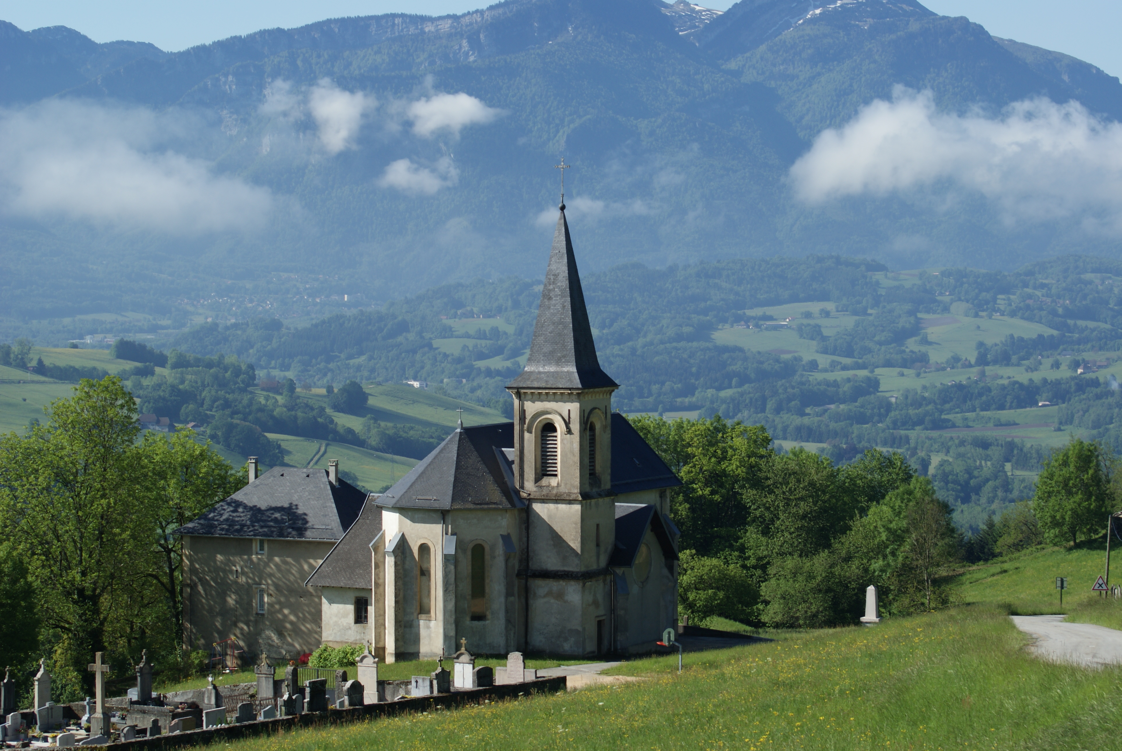 Panorama de Saint-Franc et de son église depuis la mairie